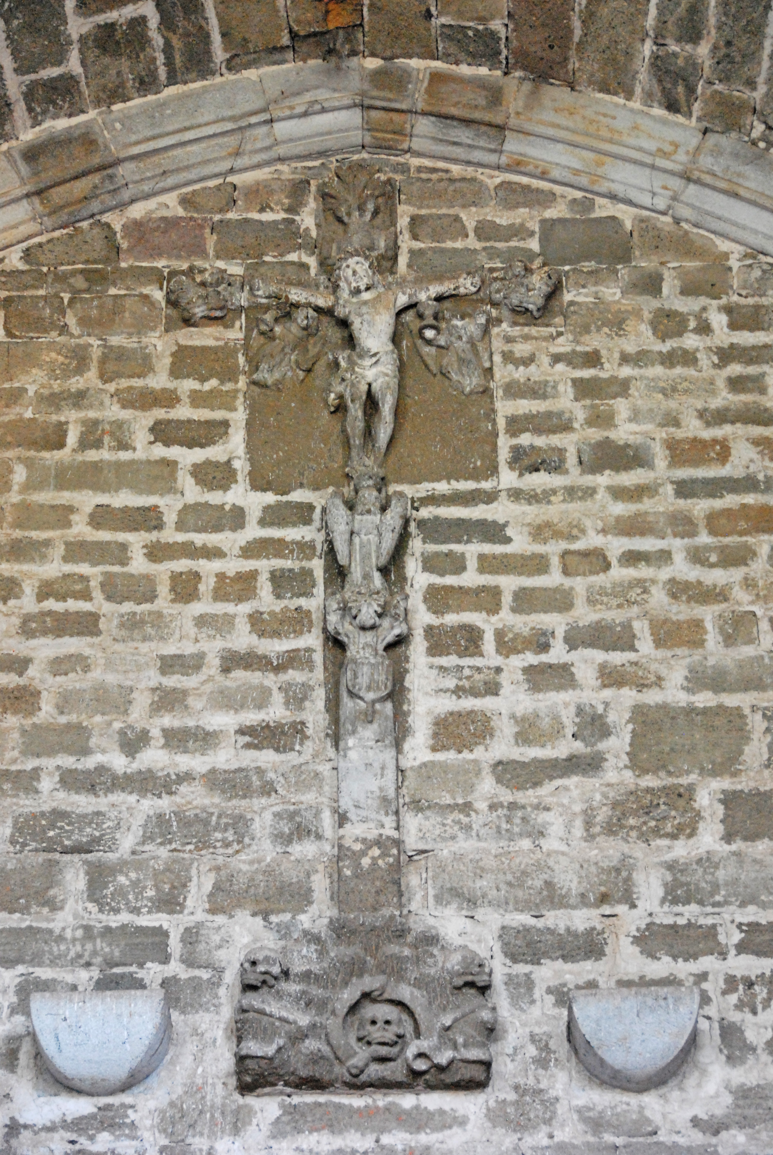 Chanteuges, Chapelle St.-Anne, triumphale Kreuzigung auf Golgotha